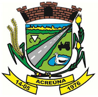 Brasão de Acreúna, Goiás, Brasil.